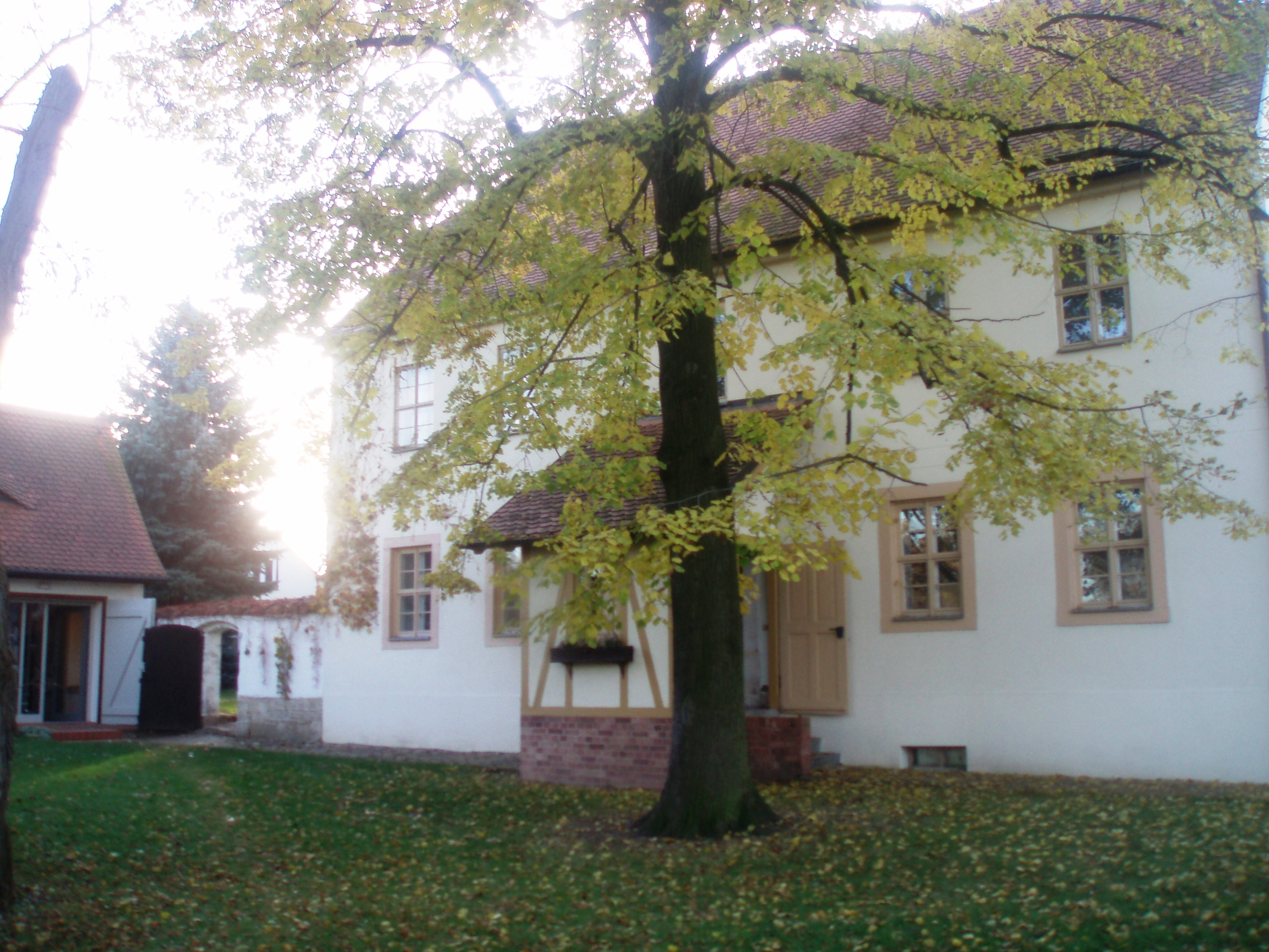 Geburtshaus von Friedrich Nietzsche in Röcken